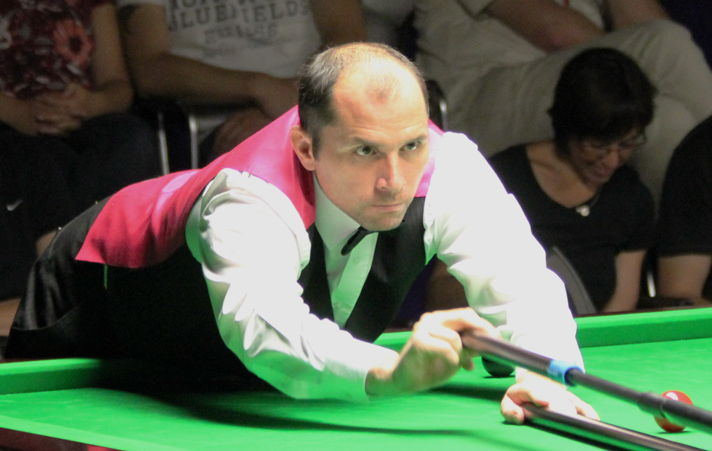 Joe Perry beim Paul Hunter Classic 2012